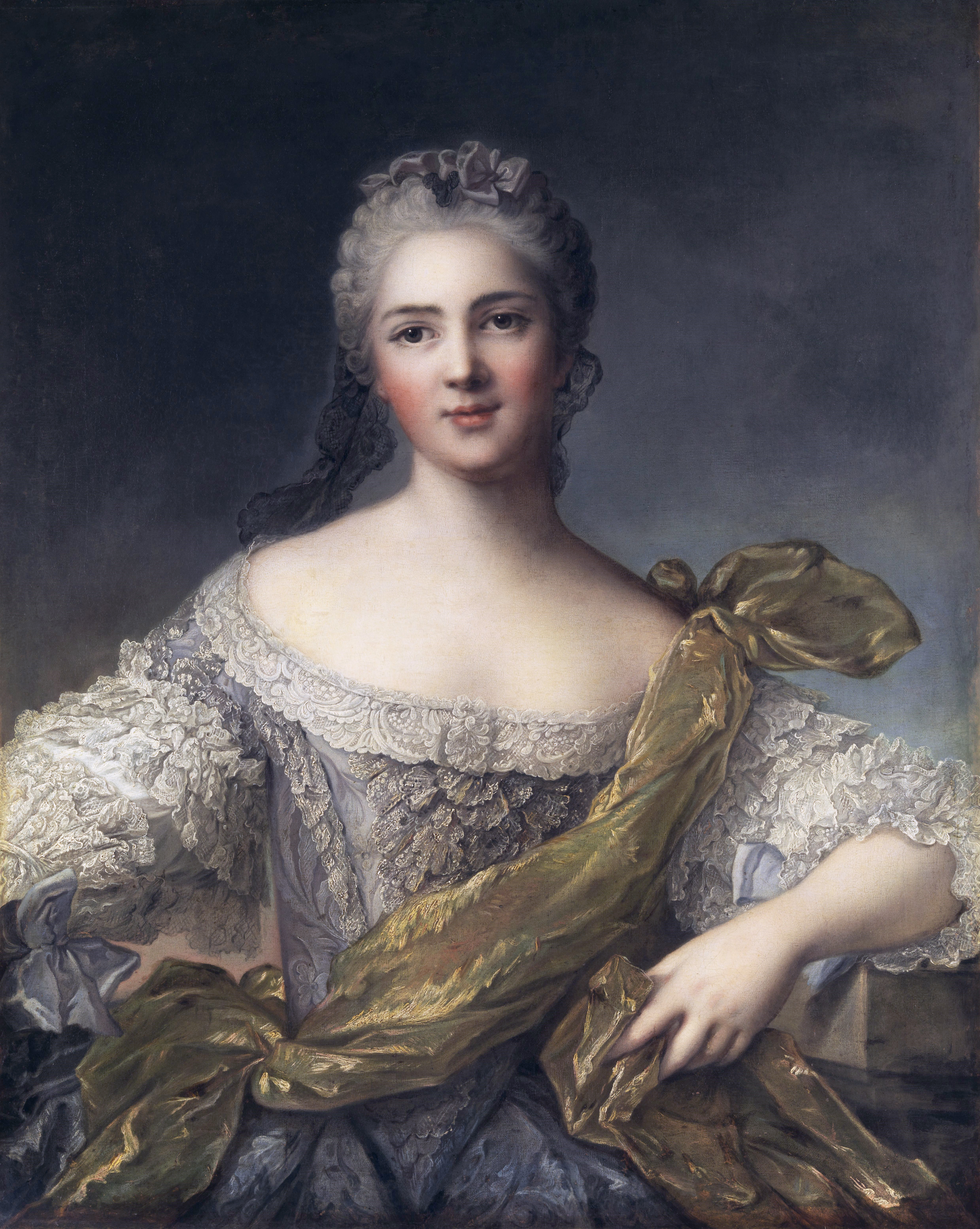 Portrait der Victoire de France (* 1733). Provenienz: Sammlung Earl of Londsdale, 1887. Auktion Christie's, London, 6. Mai 1972, Nachlass des Duke of York. Seit 1977 Privatbesitz.